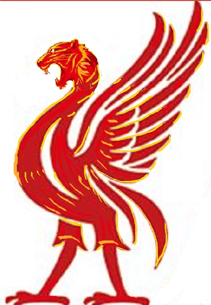 ТИГРОСТРОНГ